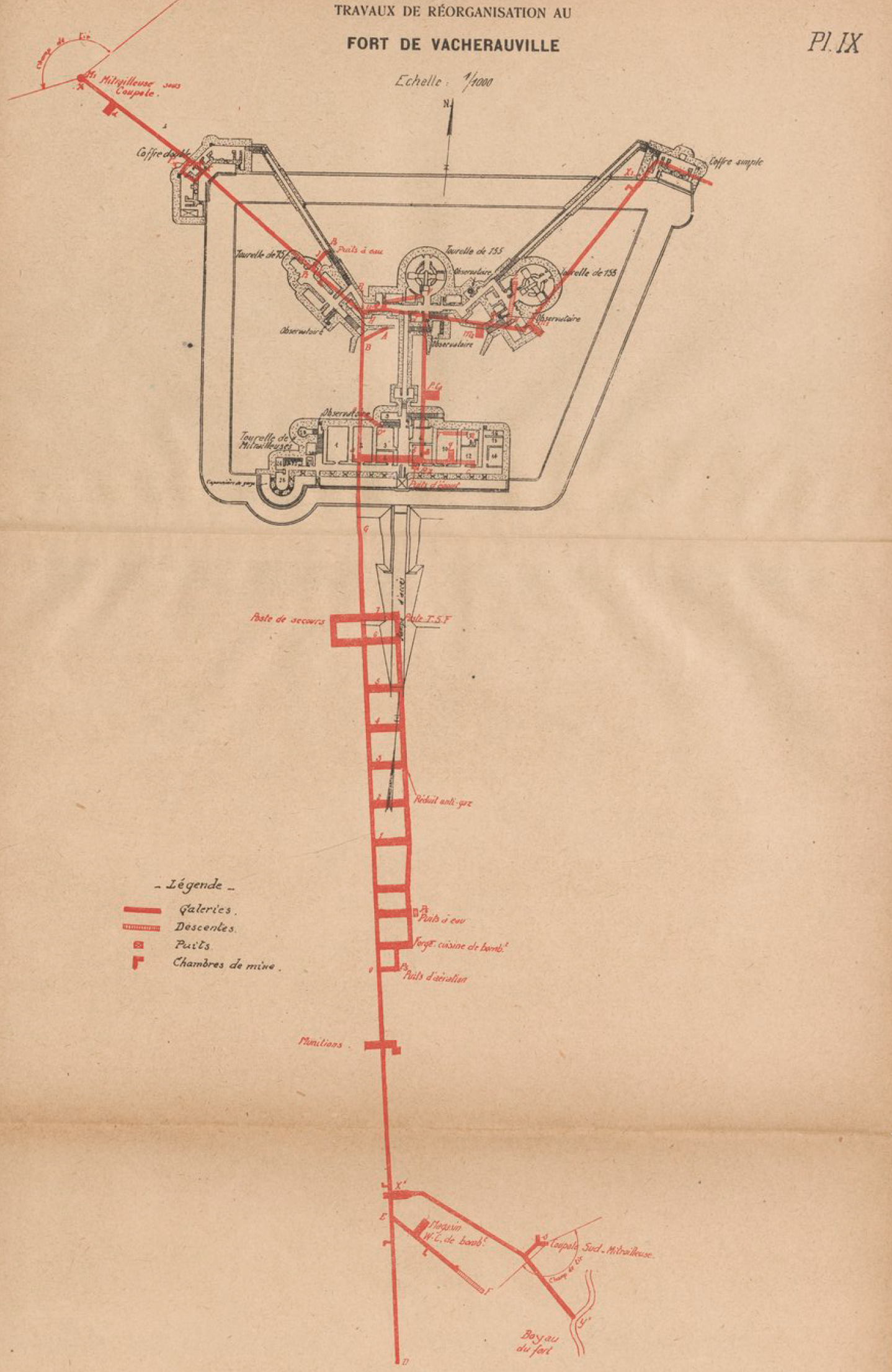 Plan du fort de Vacherauville avec les galeries creusées en 1916 et 1917.